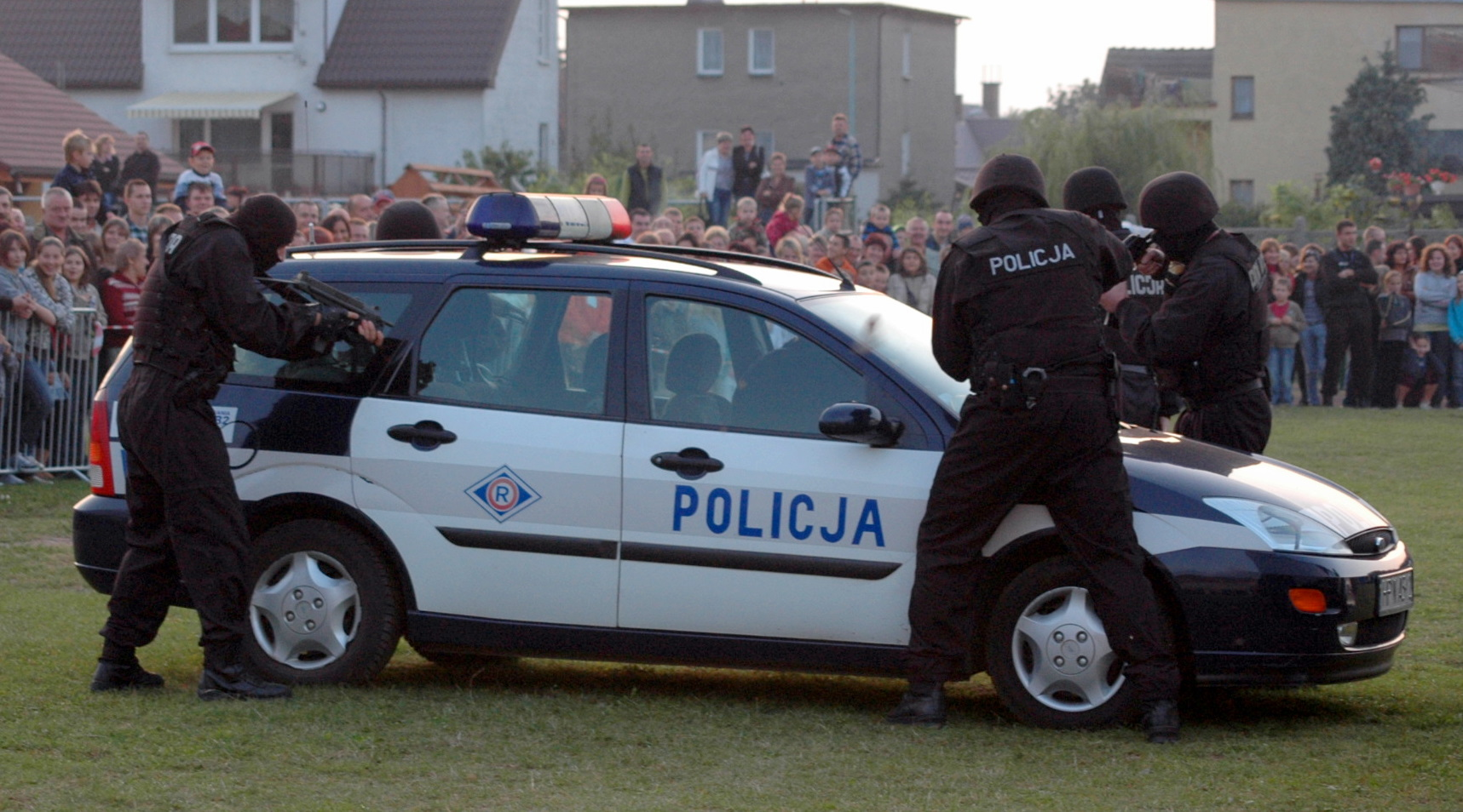 Antyterroryści z KPP w Kamieniu Pomorskim podczas występów w Wolinie